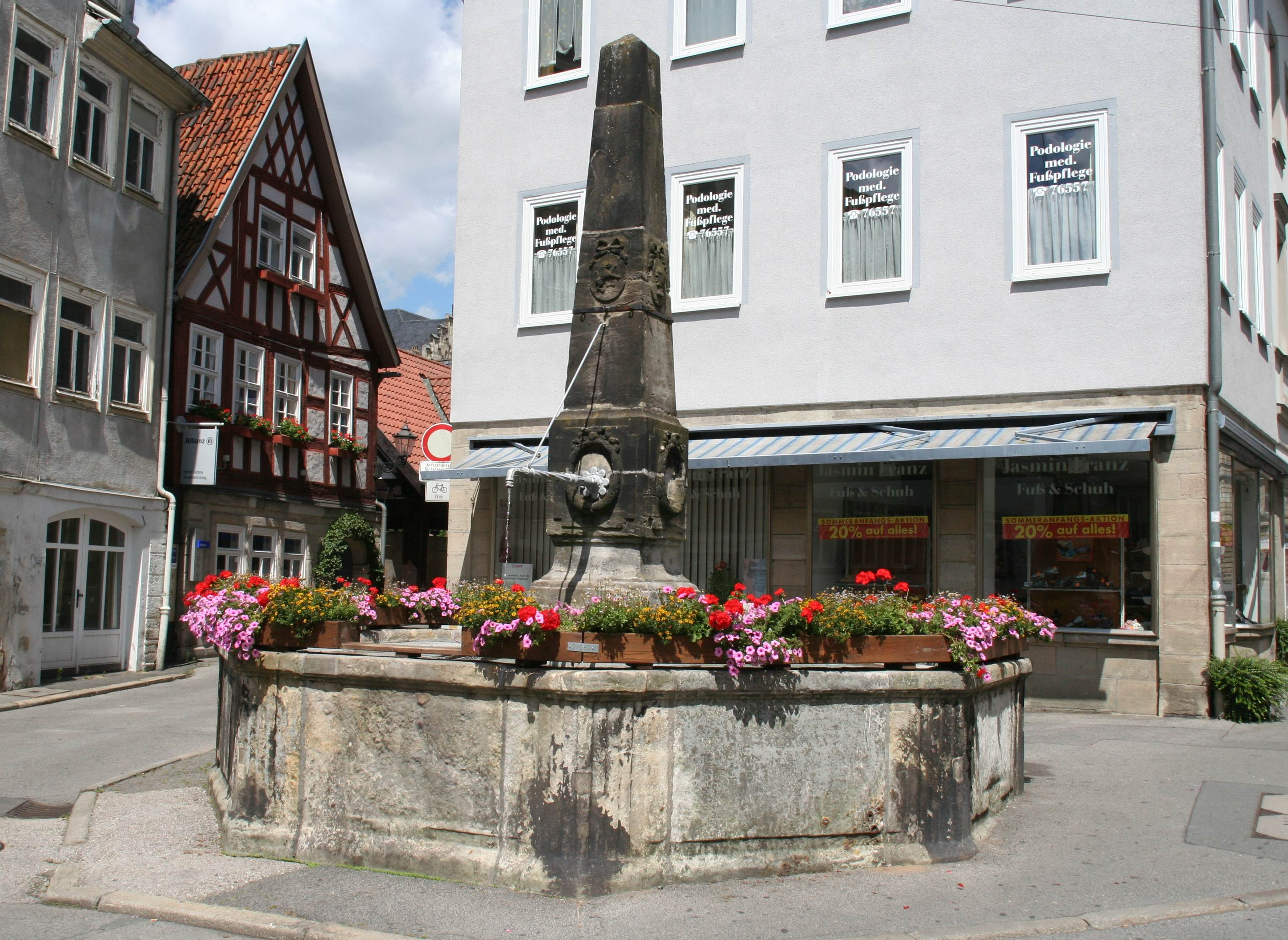 Säumarktbrunnen Ketschengasse in Coburg